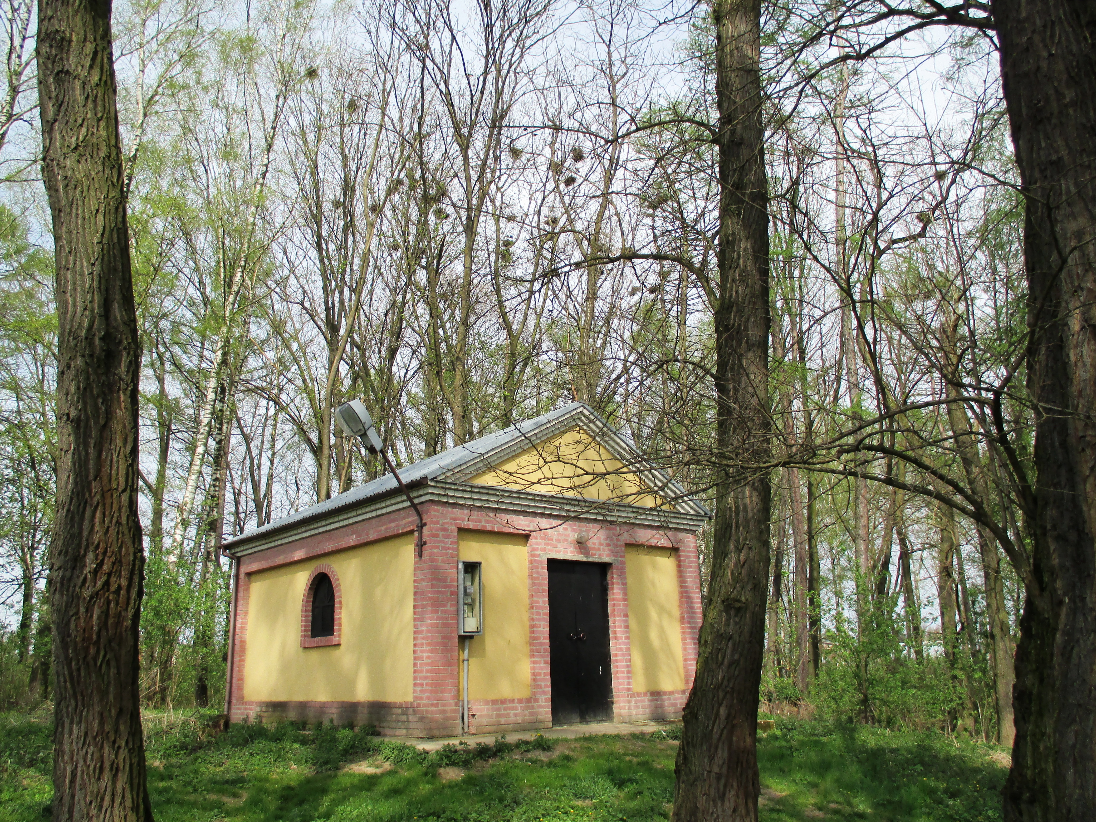 Охель цадика на Старому єврейському цвинтарі в Динові, Підкарпатське воєводство